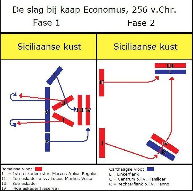 Schematisch overzicht van het stijdverloop van de slag bij kaap Ecnomus in 256 v.Chr.